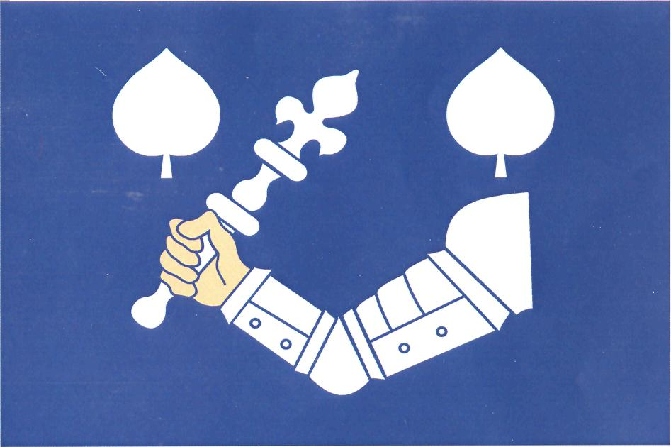 Vlajka obce Velké Petrovice